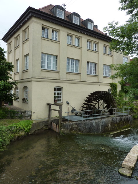 Steinheim: Mühle an der Bottwar